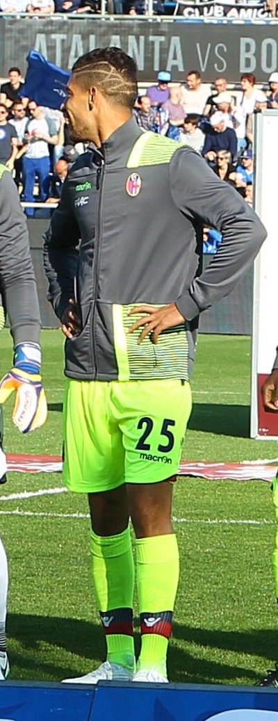 Bergamo, stadio Atleti Azzurri d'Italia, 22 aprile 2017. Il calciatore Adam Masina al Bologna, prima della trasferta persa contro l'Atalanta (2-3) e valevole per la 33ª giornata del campionato italiano di Serie A 2016-17.